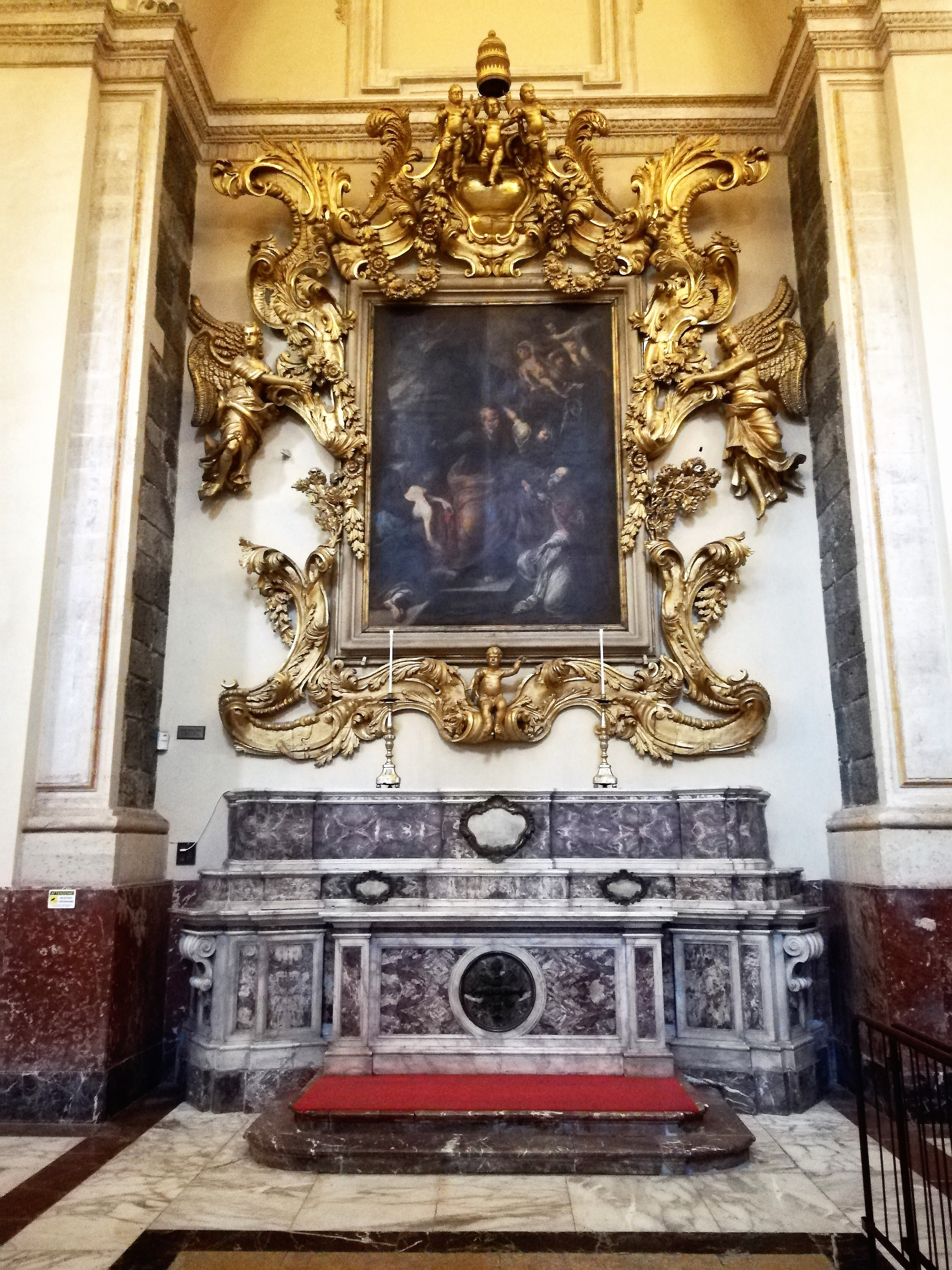 Cappella di San Berillo, dipinto raffigurante San Pietro consacra San Berillo, opera di Andrea Suppa.